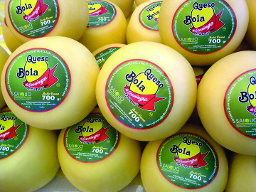 Imagen del queso bola ya empacado